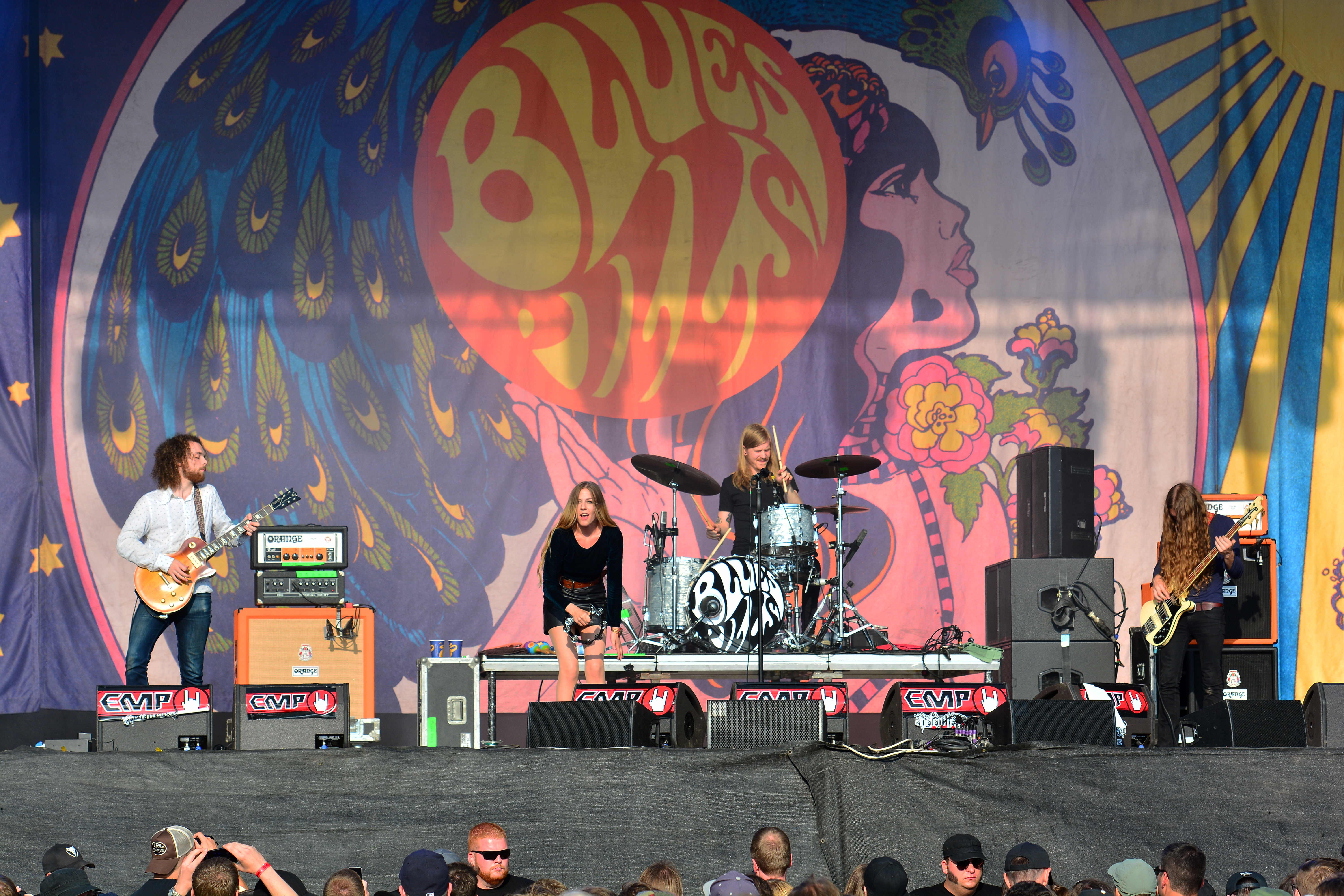 Blues Pills beim Reload Festival 2015